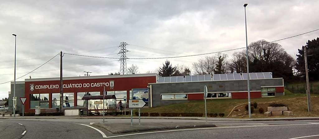 Complexo acuático no Castro de San Victorio.